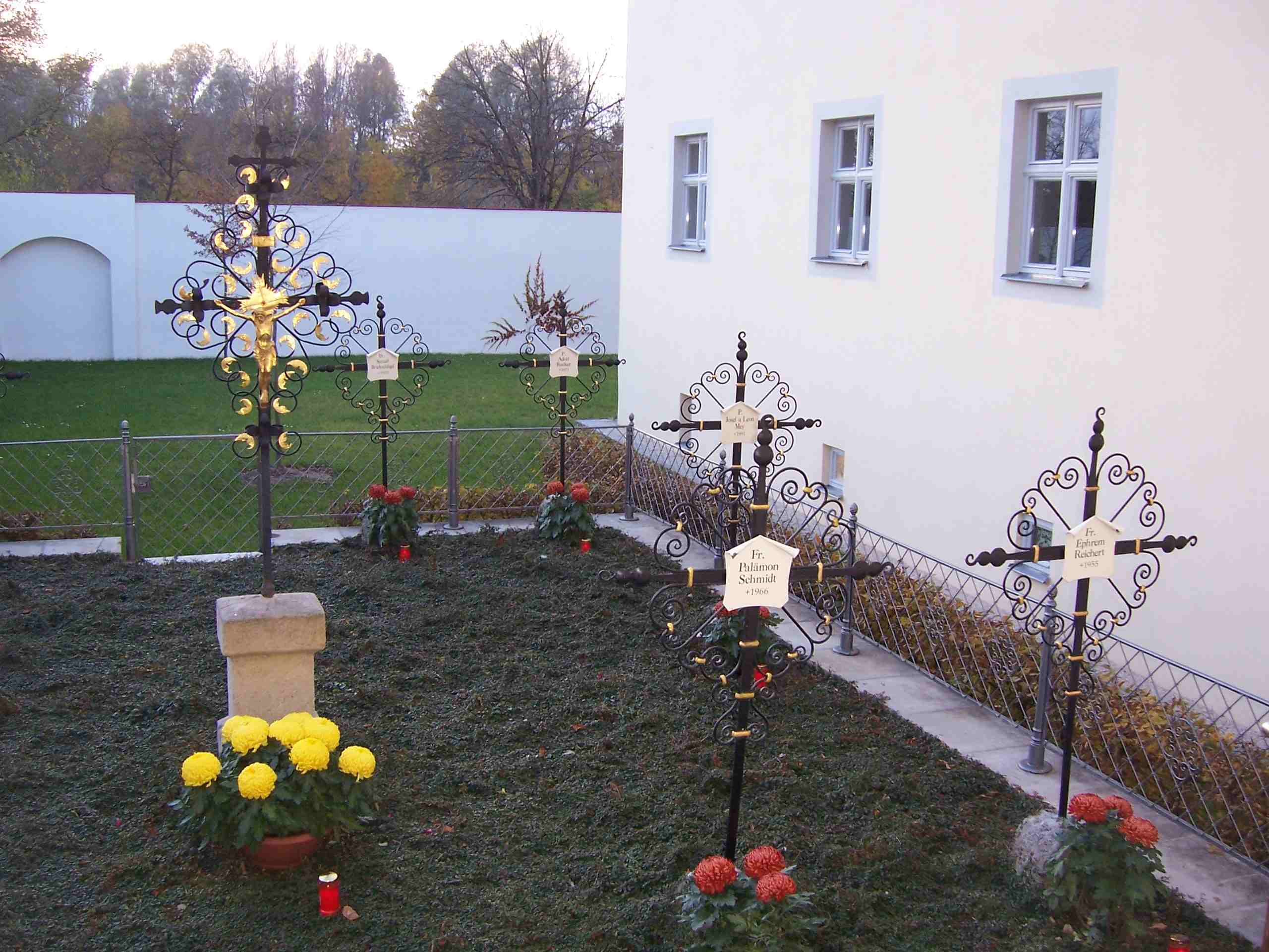 Klosterfriedhof Freystadt